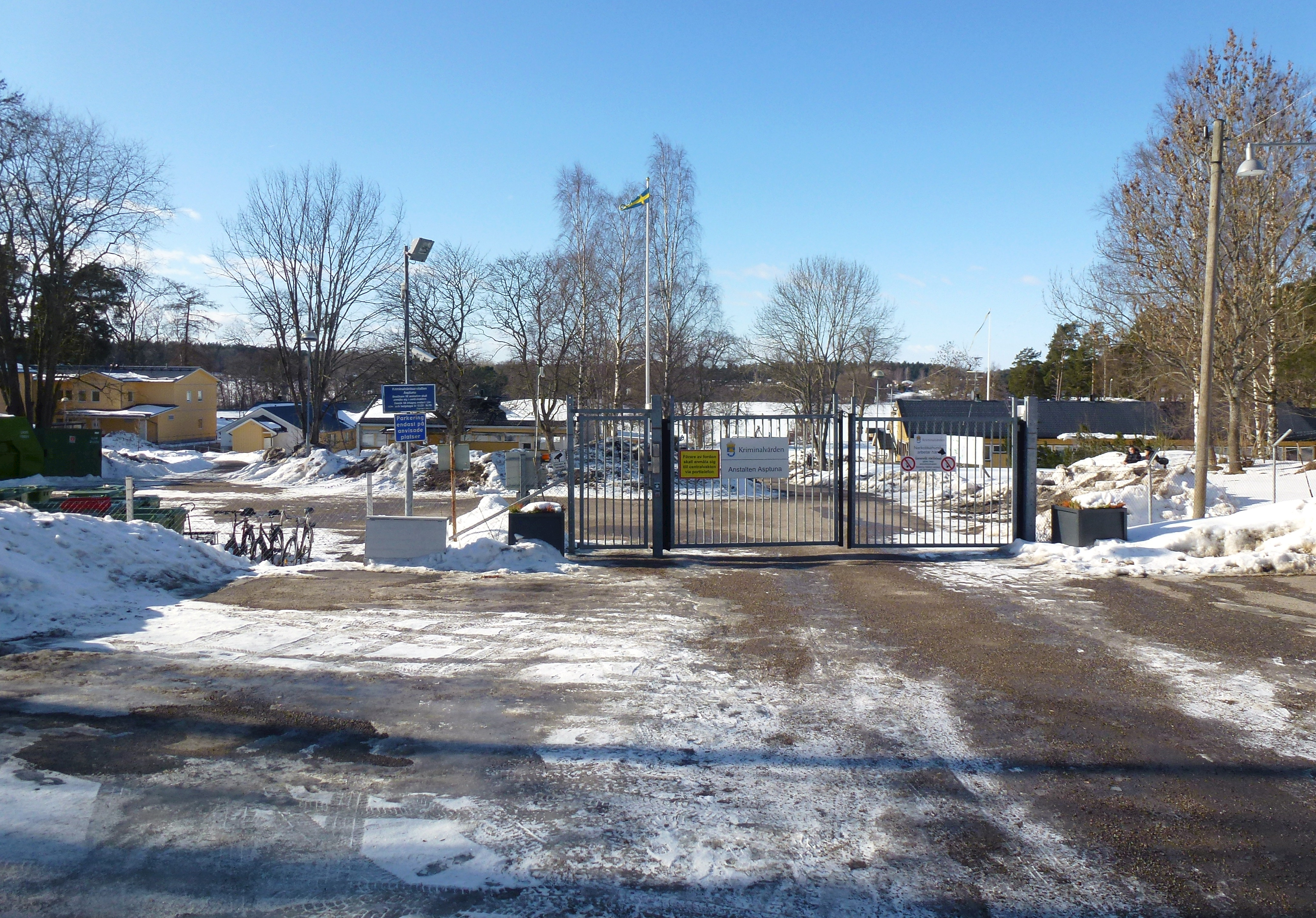 Kriminalvårdsanstalten "Asptuna" vid sjön Aspen i Botkyrka